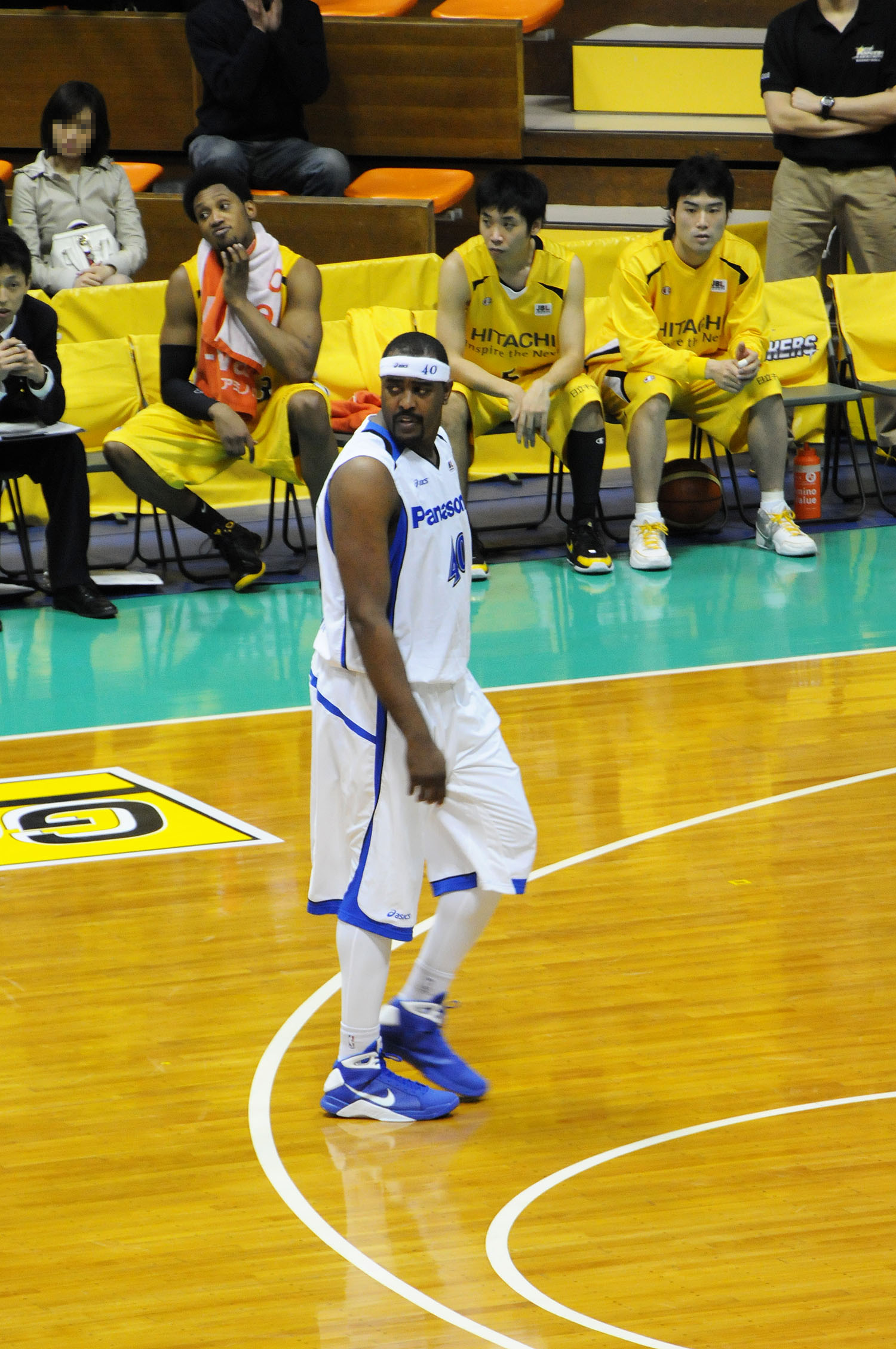 パナソニックトライアンズ、ジェラルド・ハニーカット選手。代々木第二体育館で。